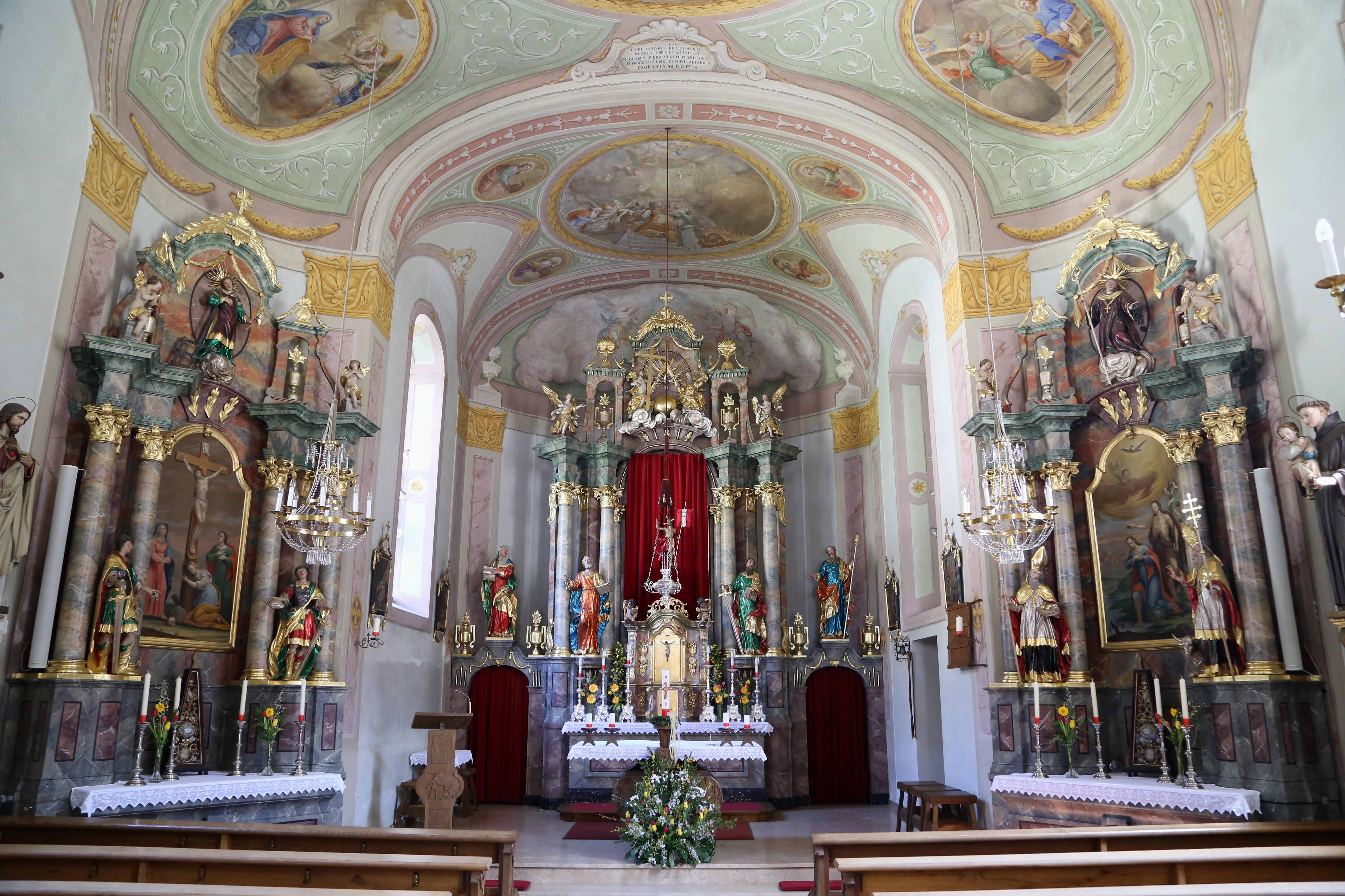 Kath. Pfarrkirche Mariahilf und Friedhof, Landl, Thiersee